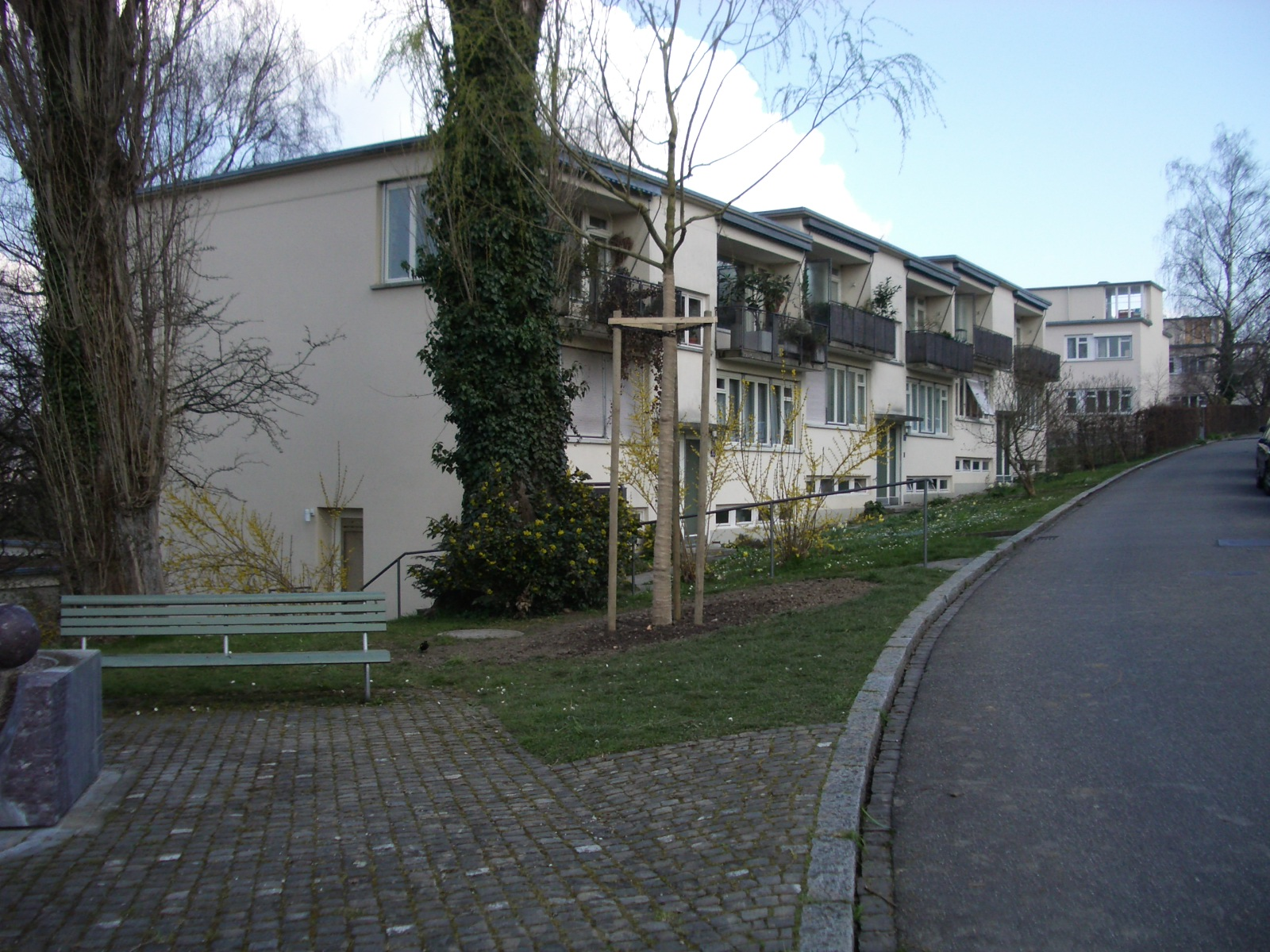 Zurich, Switzerland self-made, March 2007